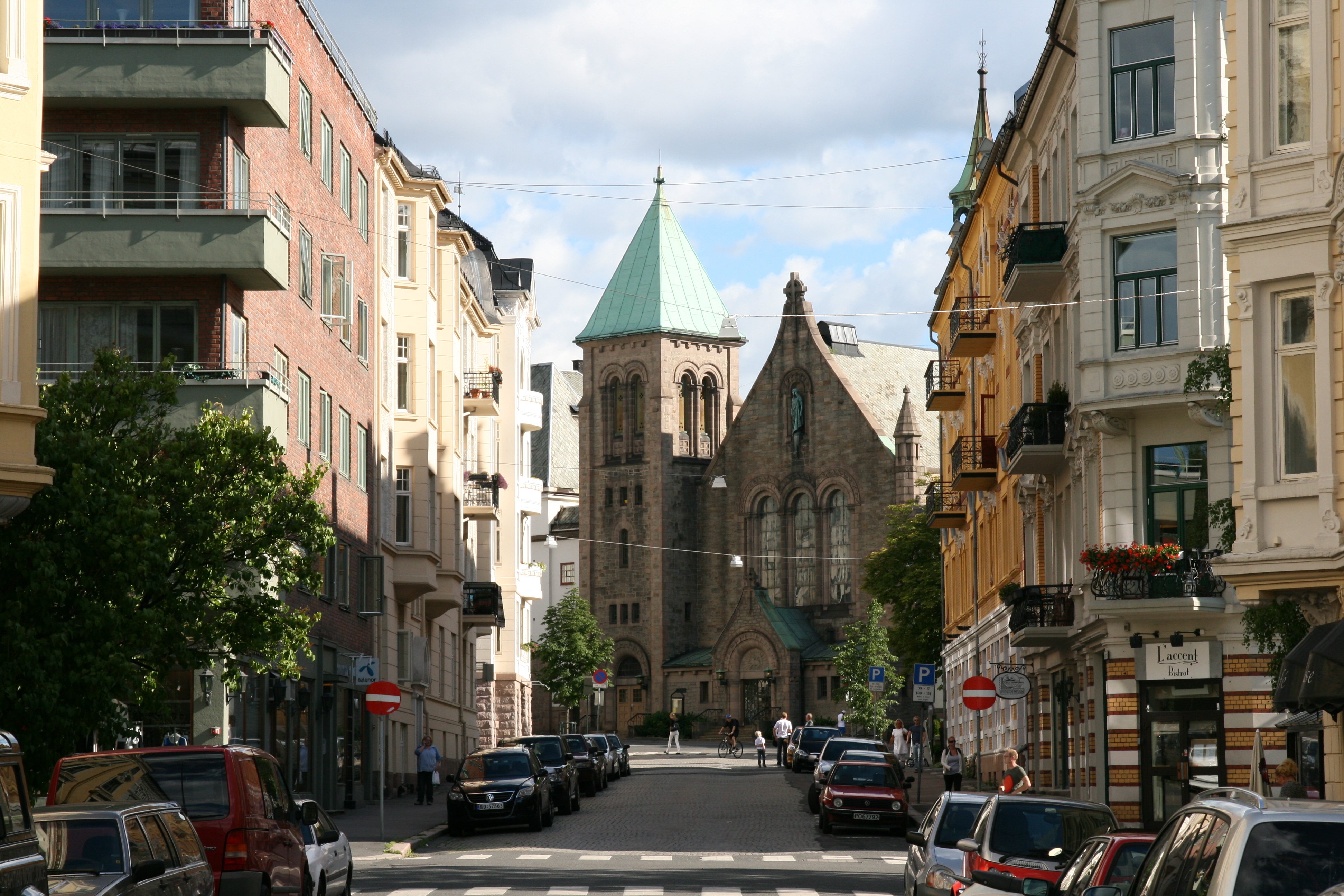 Gimleveien med Frogner kirke i enden av gaten, Frogner i Oslo